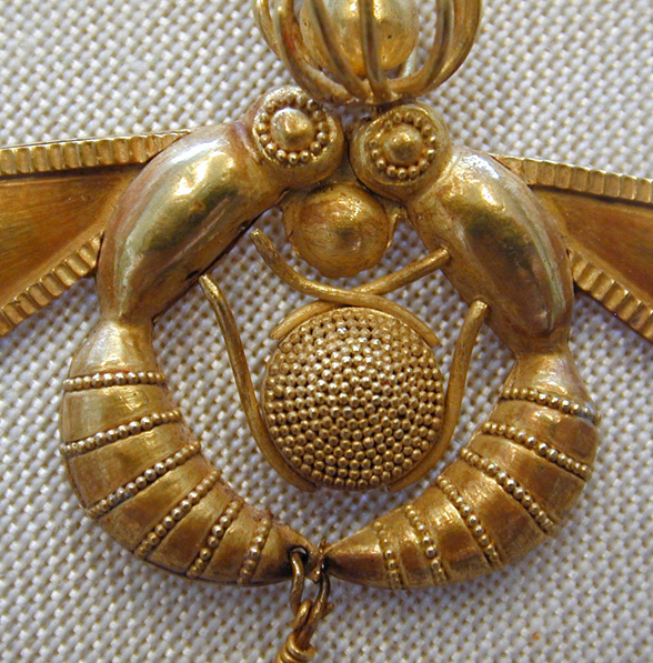 Détail d'un collier en or Objet de la culture minoenne du musée archéologique d'Héraklion Photo numérique prise en 2001